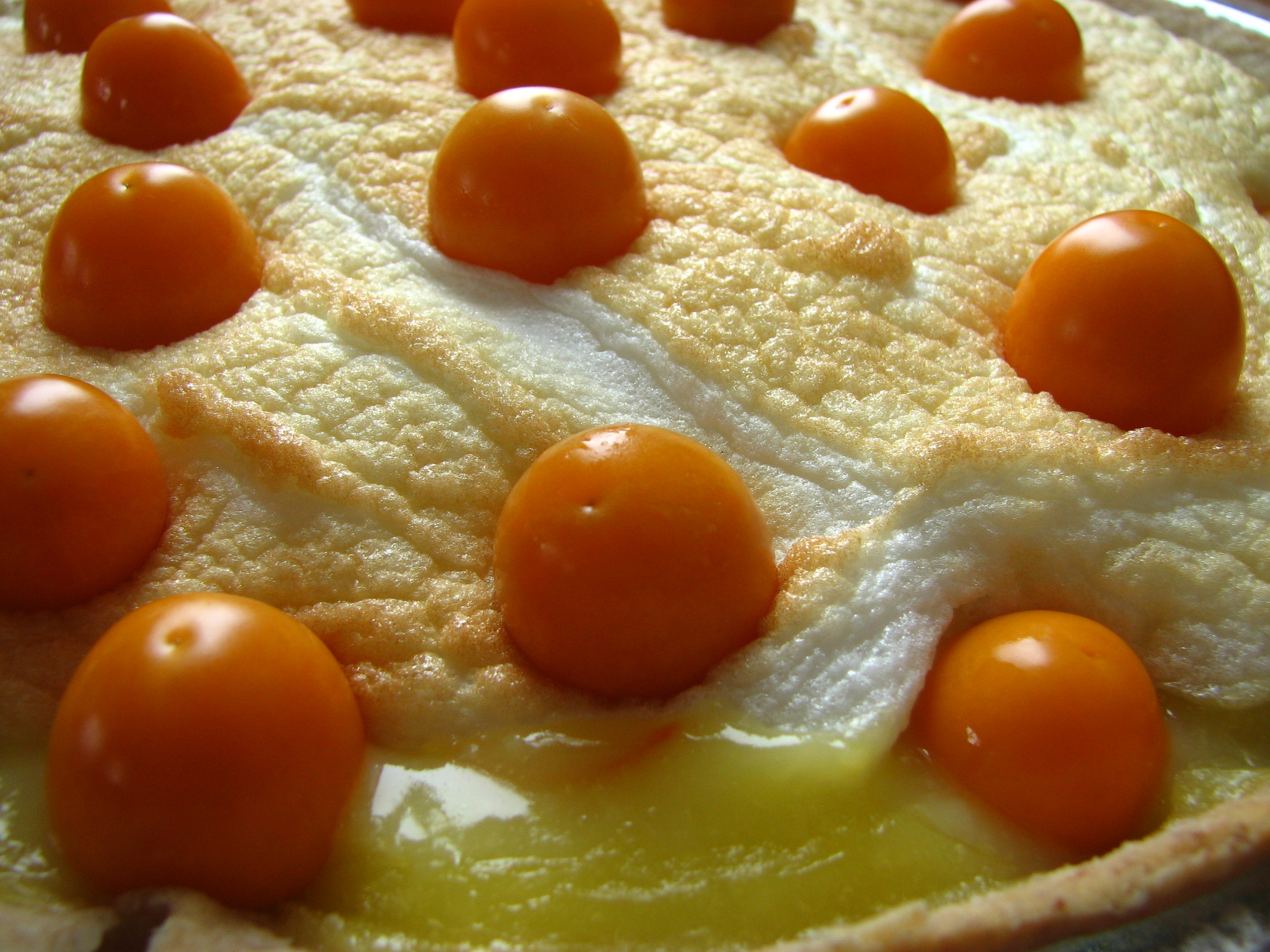 Tarte aux citron avec cerises de terre (Physalis heterophylla), préparée par Isabelle Cliche (Îles-de-la-Madeleine).